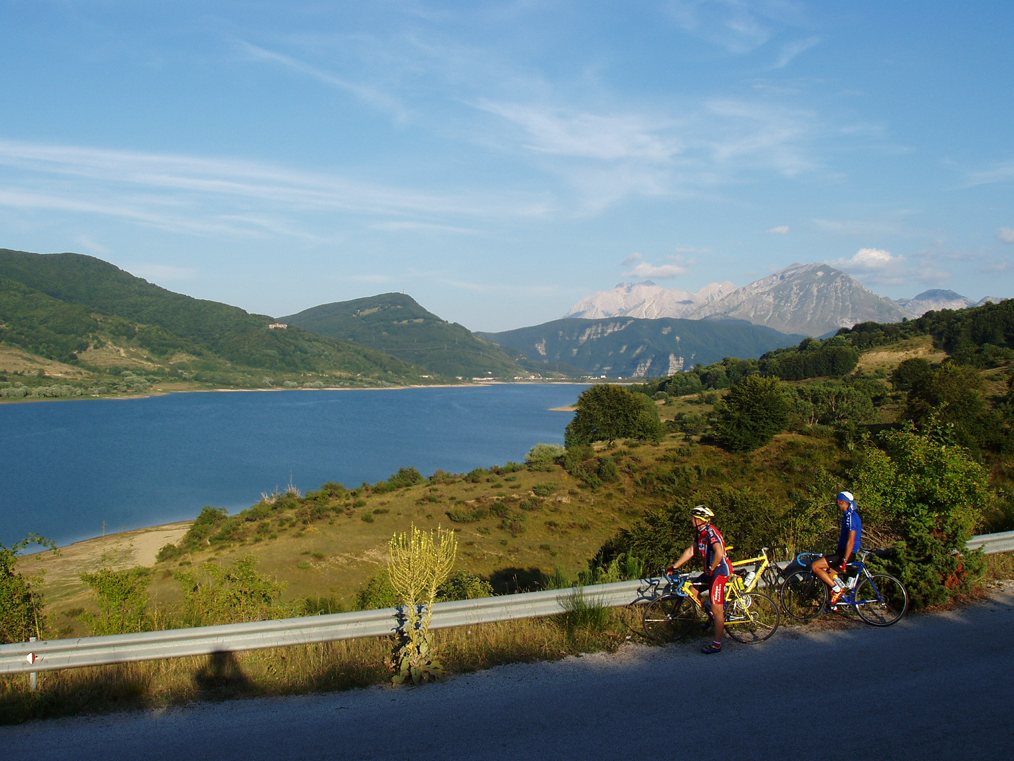 Cicloturimso sul Lago di Campotosto